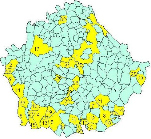 Municipios de Cuenca con más de 1000 habitantes